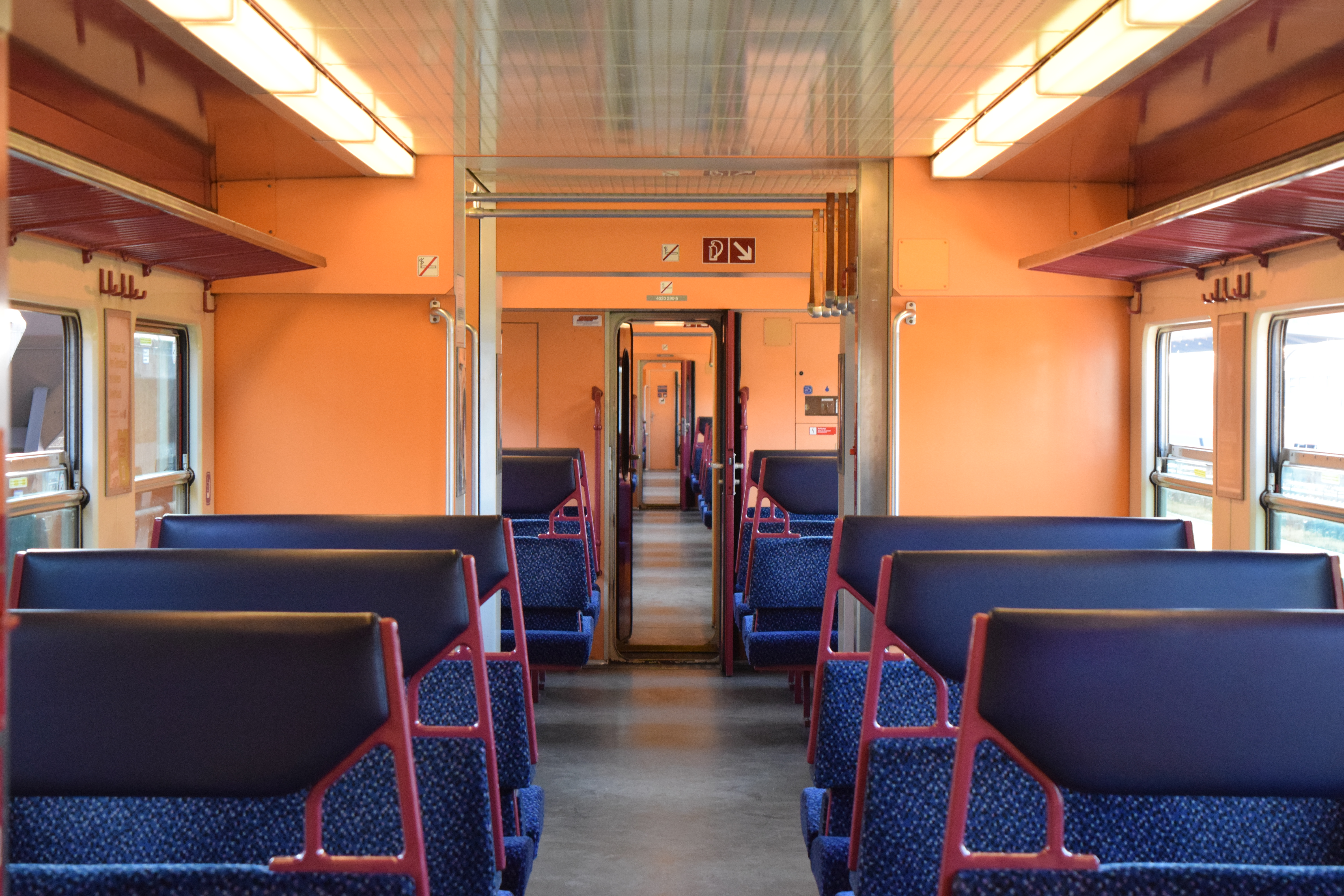 Der Innenraum eines ÖBB 4020